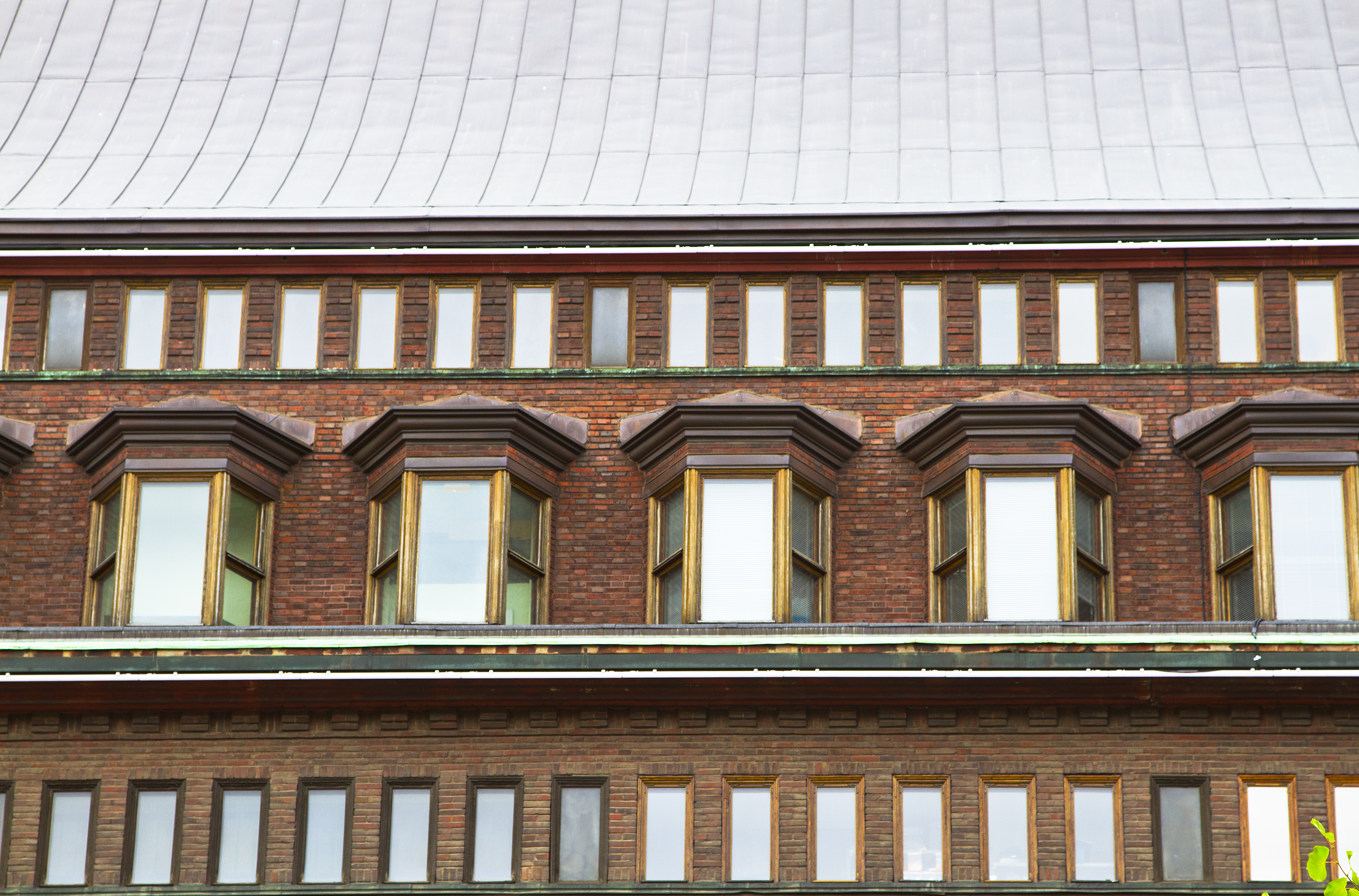 Stockmannin tavaratalon yläikkunat.